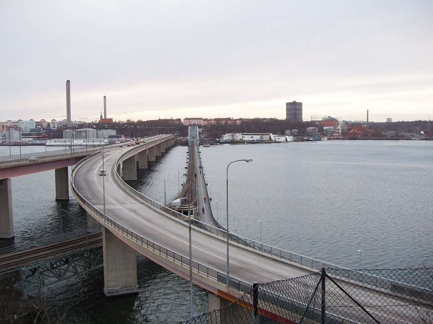 Lidingöbroarna mot Stockholm. Bridges between Lidingö and Stockholm. View from Lidingö, Sweden.